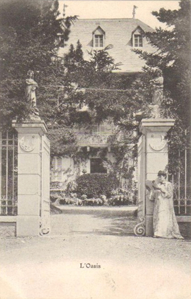 Marie Caire Tonoir (1860-1934) devant la propriété familiale à Jausiers